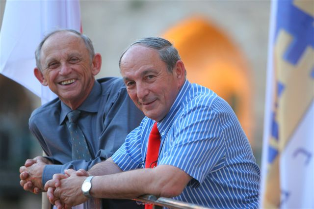 בעלי קבוצת ויסמן